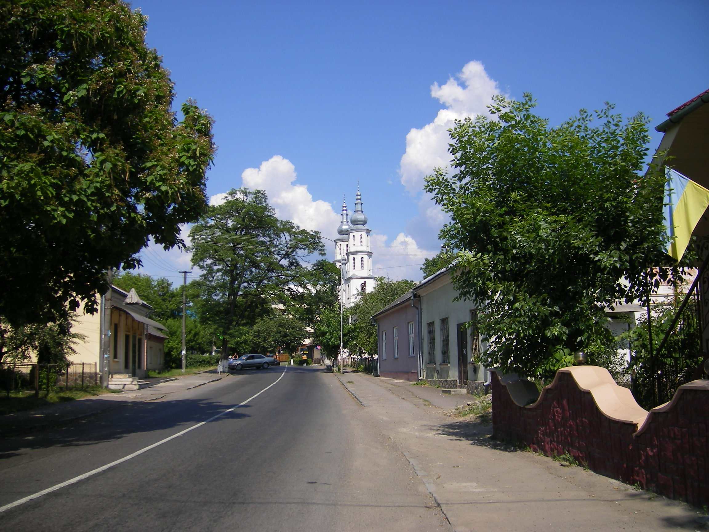 Perechyn